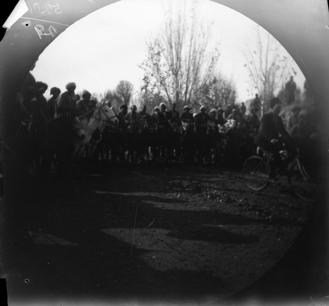 1891. Снимки Туркестана из альбома кругосветного путешествия на велосипедах Томаса Аллена